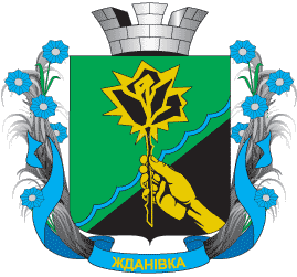 Герб Жданівки